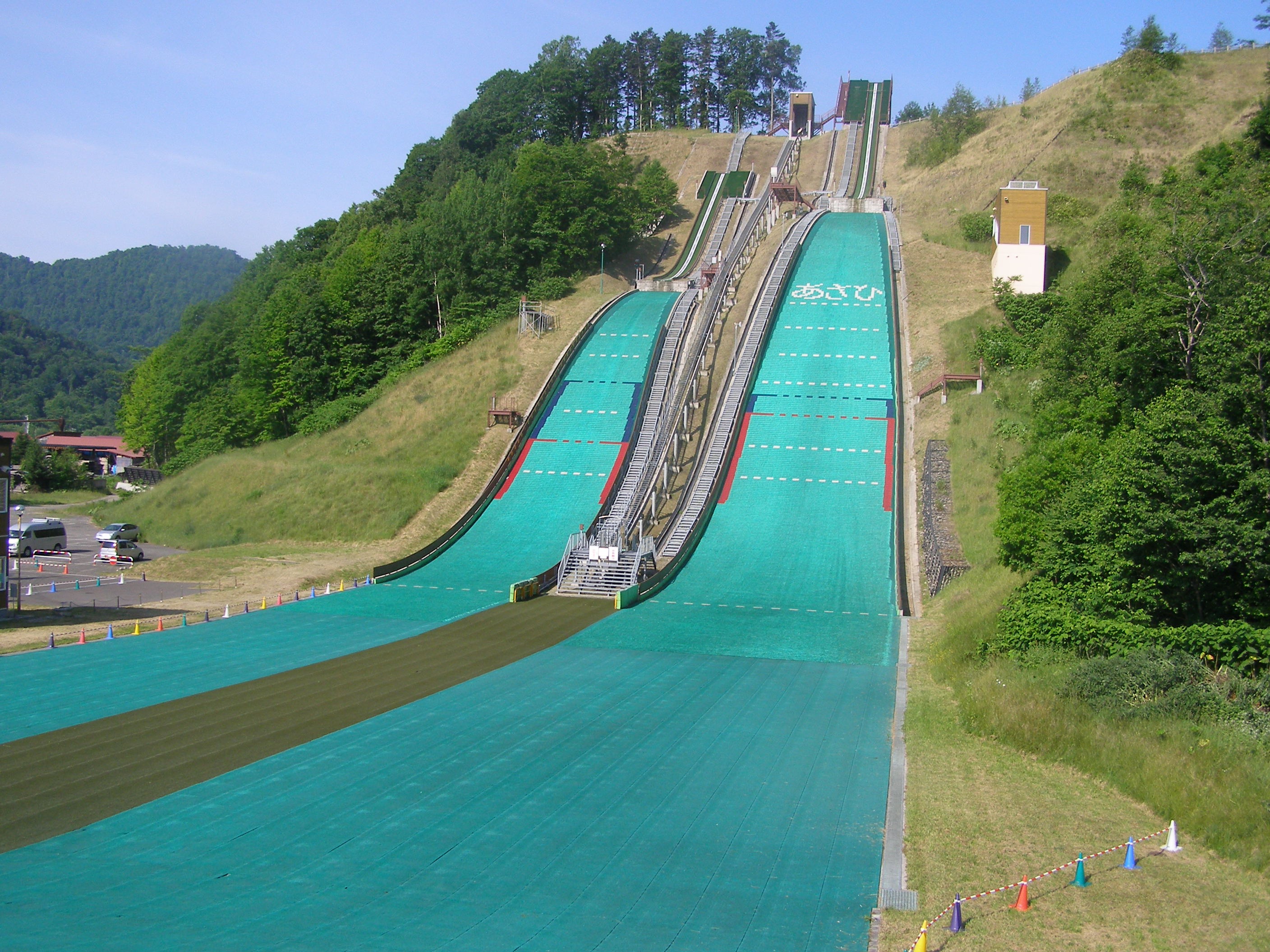 Sanbo-dai schanze(朝日三望台シャンツェ）スキージャンプ競技場